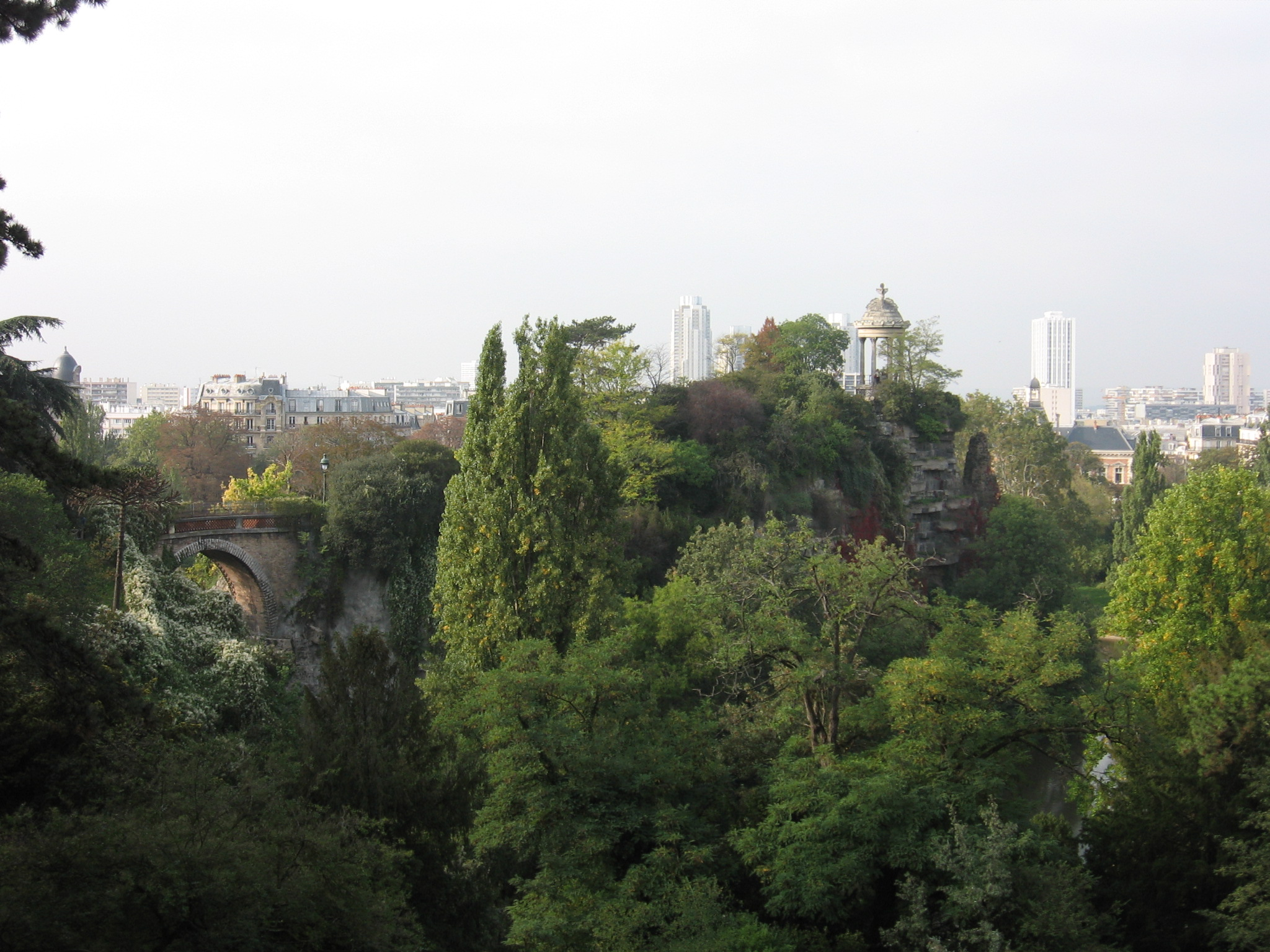 Paris, Parc Buttes-Chaumont